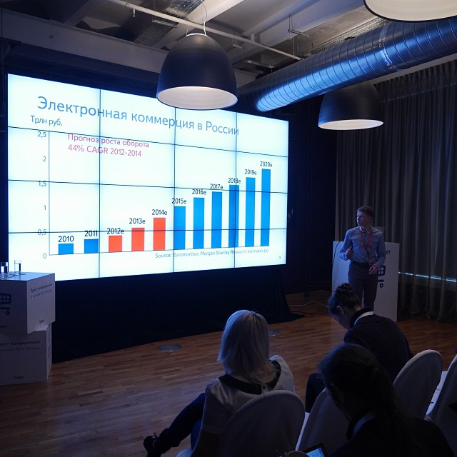 Началась пресс-конференция Яндекс.Маркета, по их словам - 17 млн посетителей в год